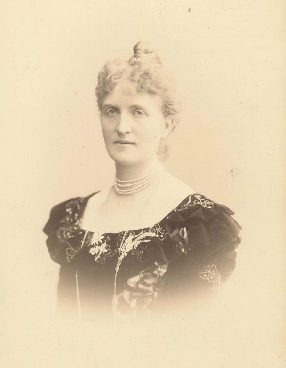 Porträtfotografie von Ida Louise Henriette von Schubert, Tochter von Carl Ferdinand von Stumm-Halberg. Ehefrau von Conrad von Schubert